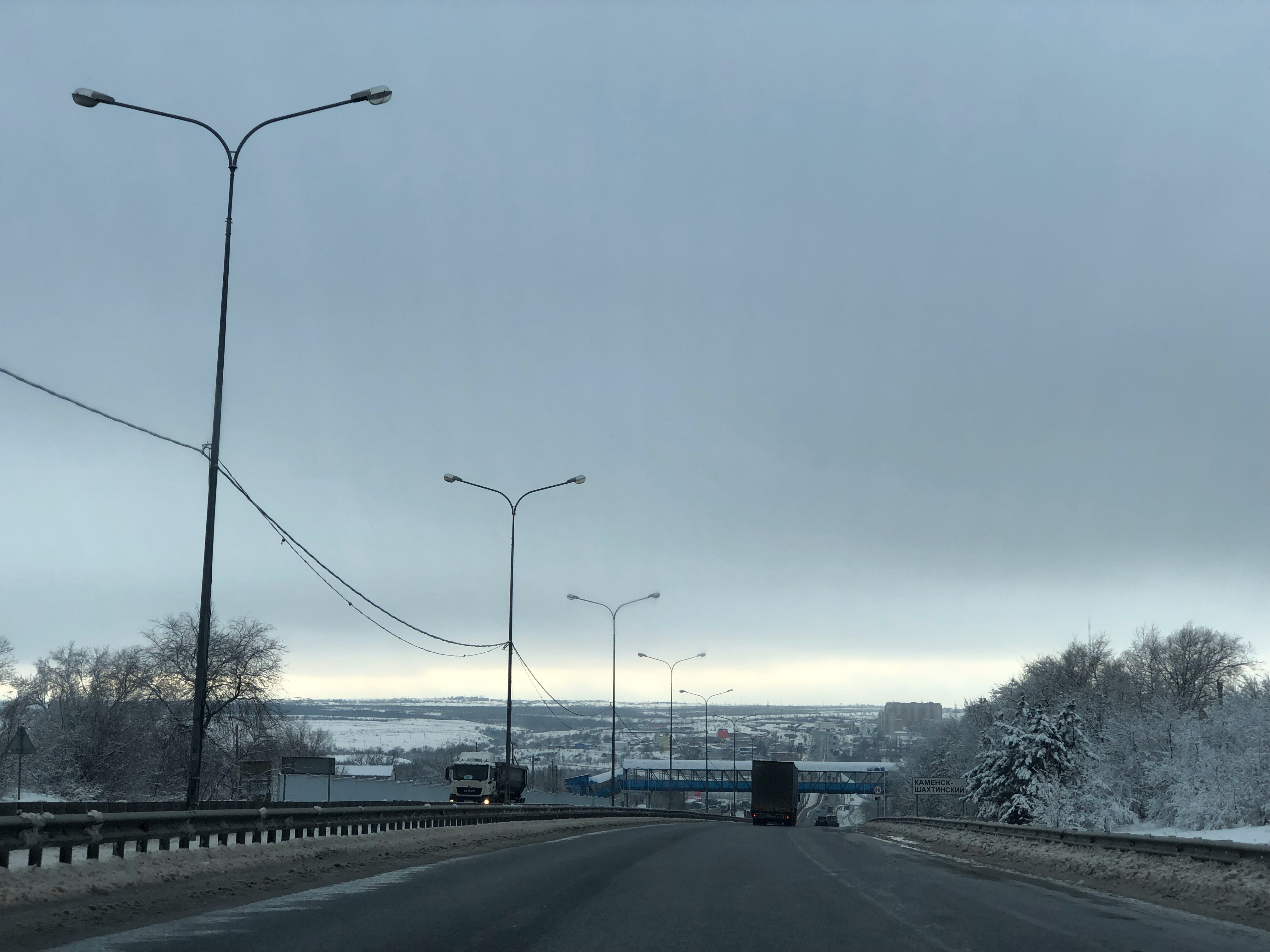 М4 в Каменском районе